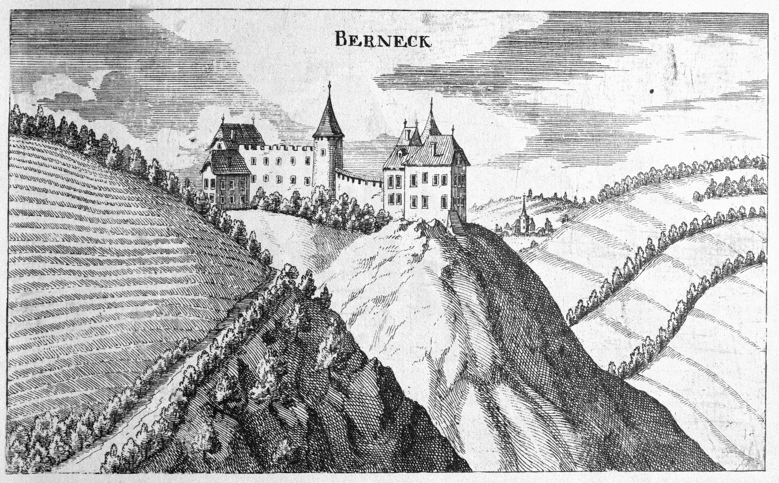 G. M. Vischers Käyserlichen Geographi, Topographia Ducatus Stiriae, Das ist: Eigentliche Delineation / und Abbildung aller Städte / Schlösser / Marcktfleck / Lustgärten / Probsteyen / Stiffter / Clöster und Kirchen / so es sich im Herzogthumb Steyrmarck befinden; Und anjetzo Umb einen billichen Preyß zu finden seynd Bey Johann Bitsch Universitäts Buchhandlern / Auff dem Juden=Platz bey der guldenen Saulen. Graz 1681 Die Nummerierung der Dateien folgt der alphabetischen Reihung der Orte